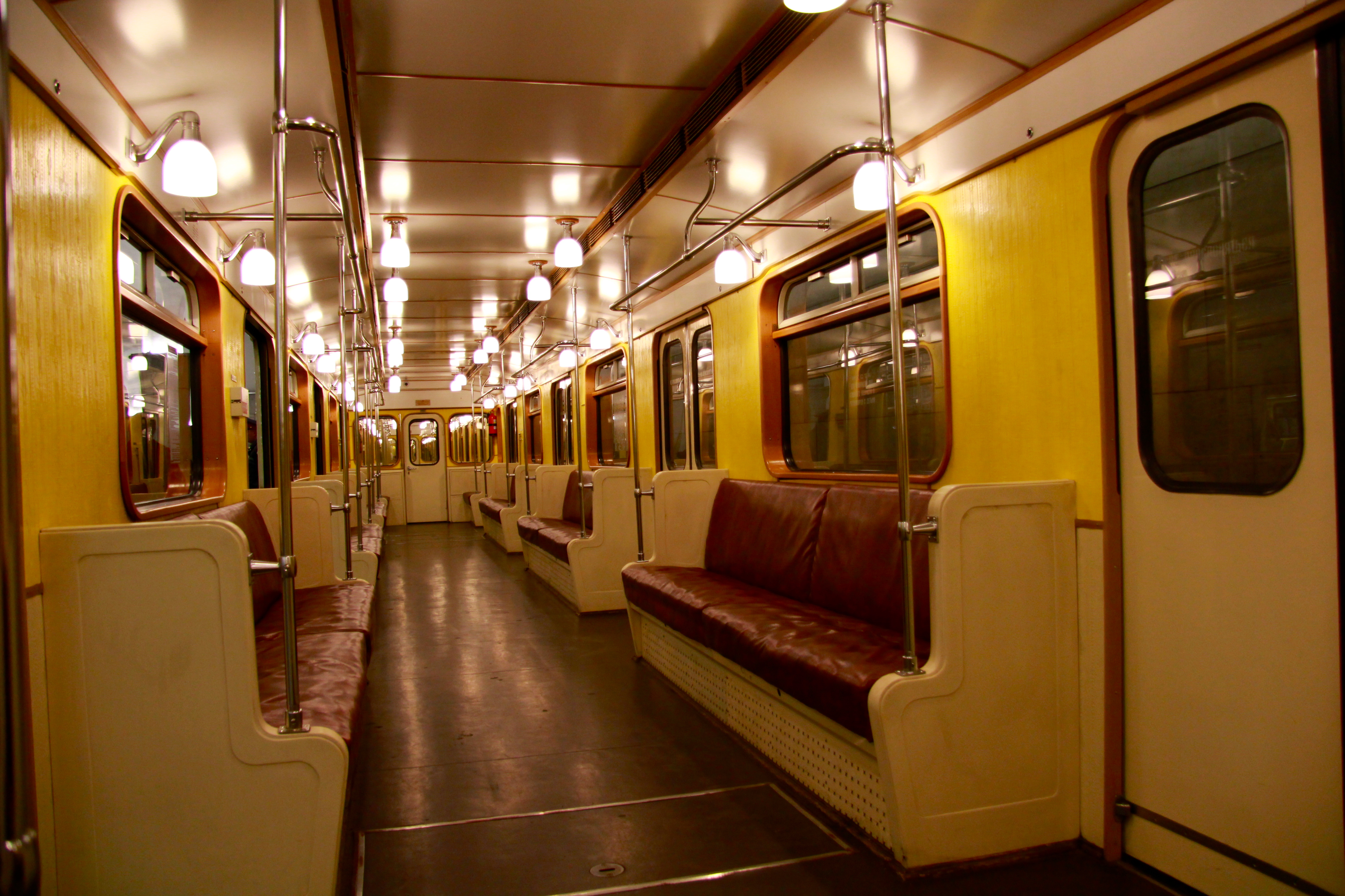 Kropotkinskaya station. Night of the 76th anniversary of Moscow Metro. (Станция Кропоткинская. Ночь 76го юбилея Московского метро.)